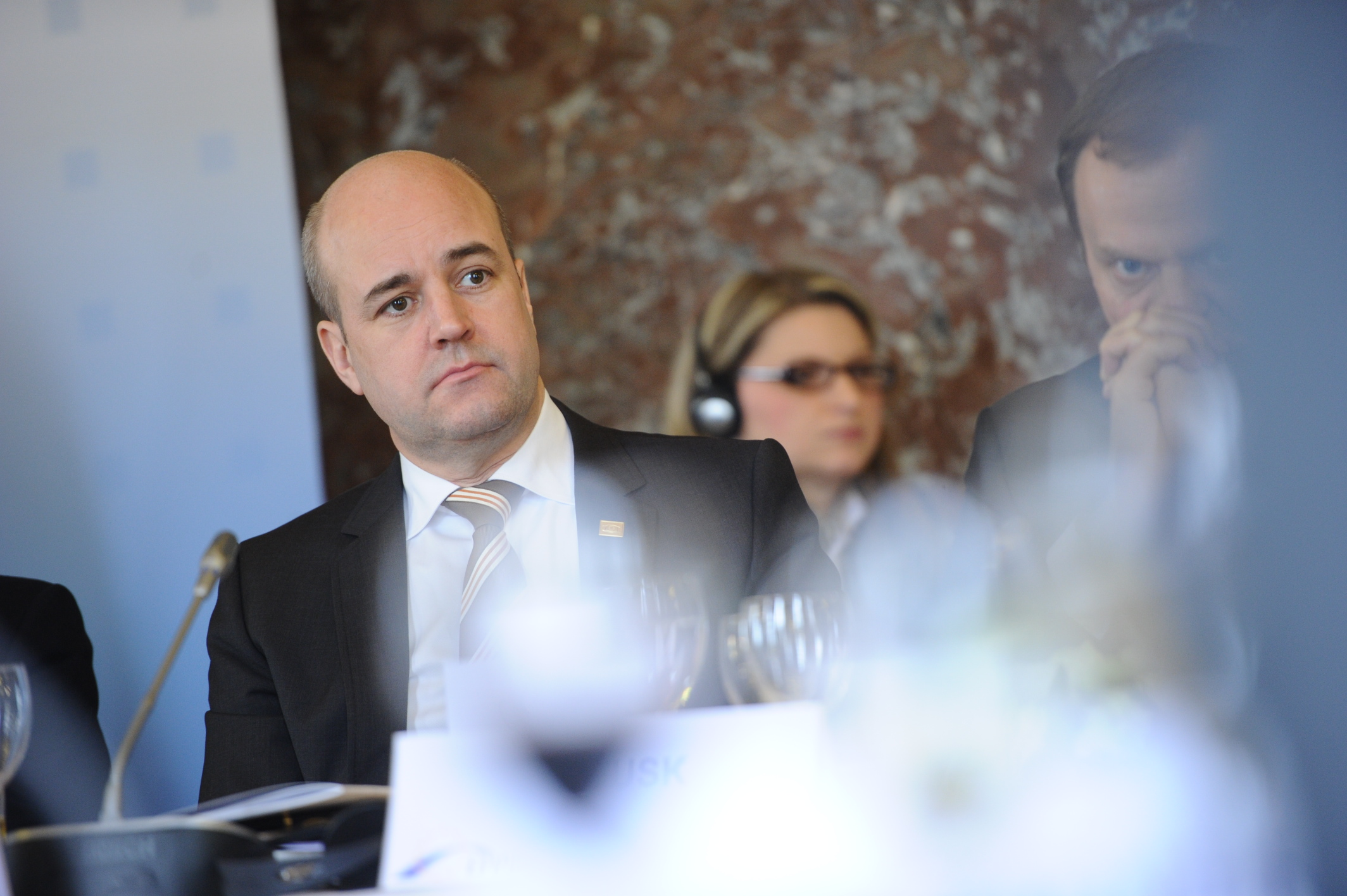 Fredrik Reinfeldt